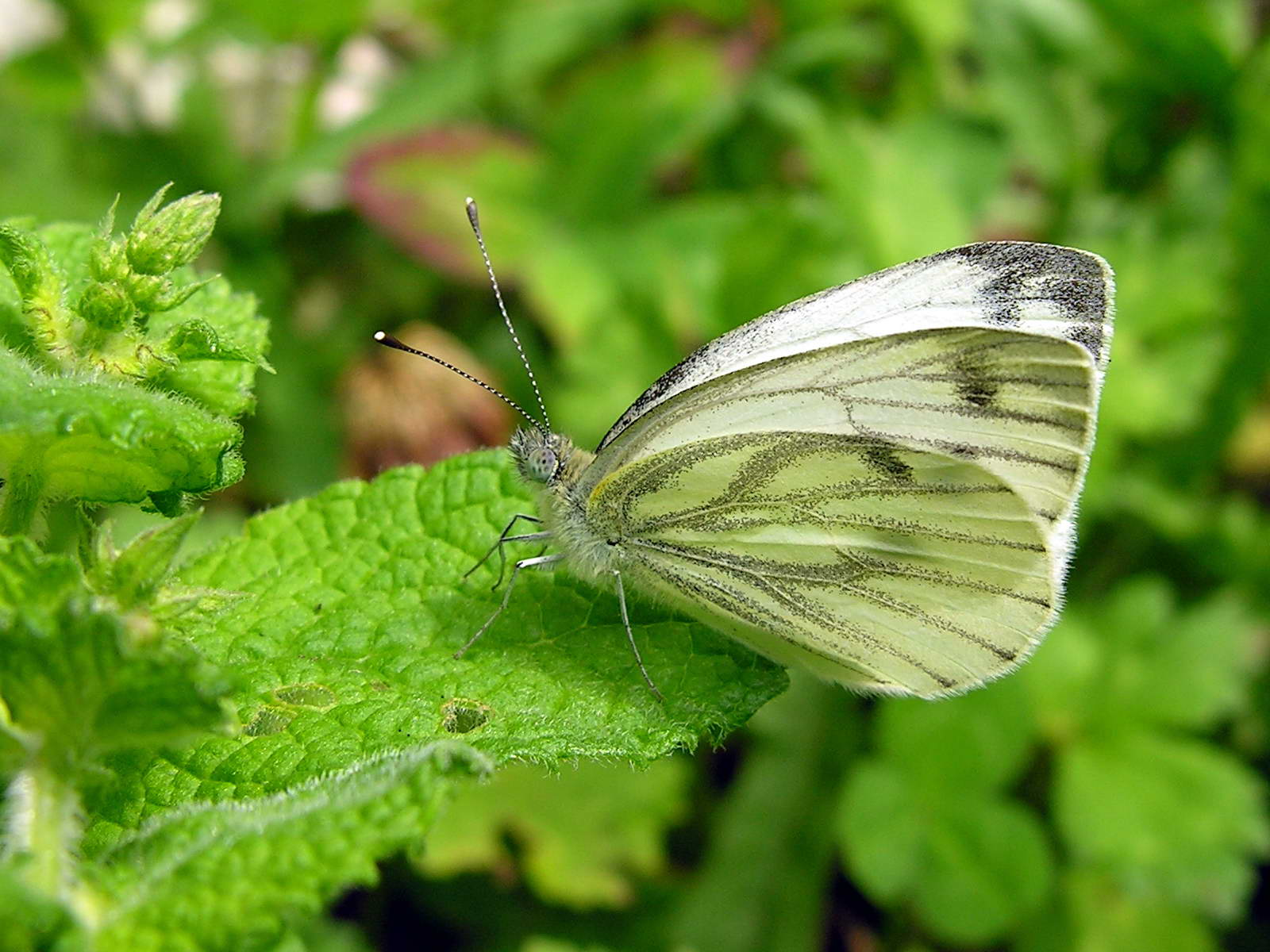 Bolboreta. Foto realizada en Bastavales o 31-07-2005 Publish by= Luis Miguel Bugallo Sánchez. Self made